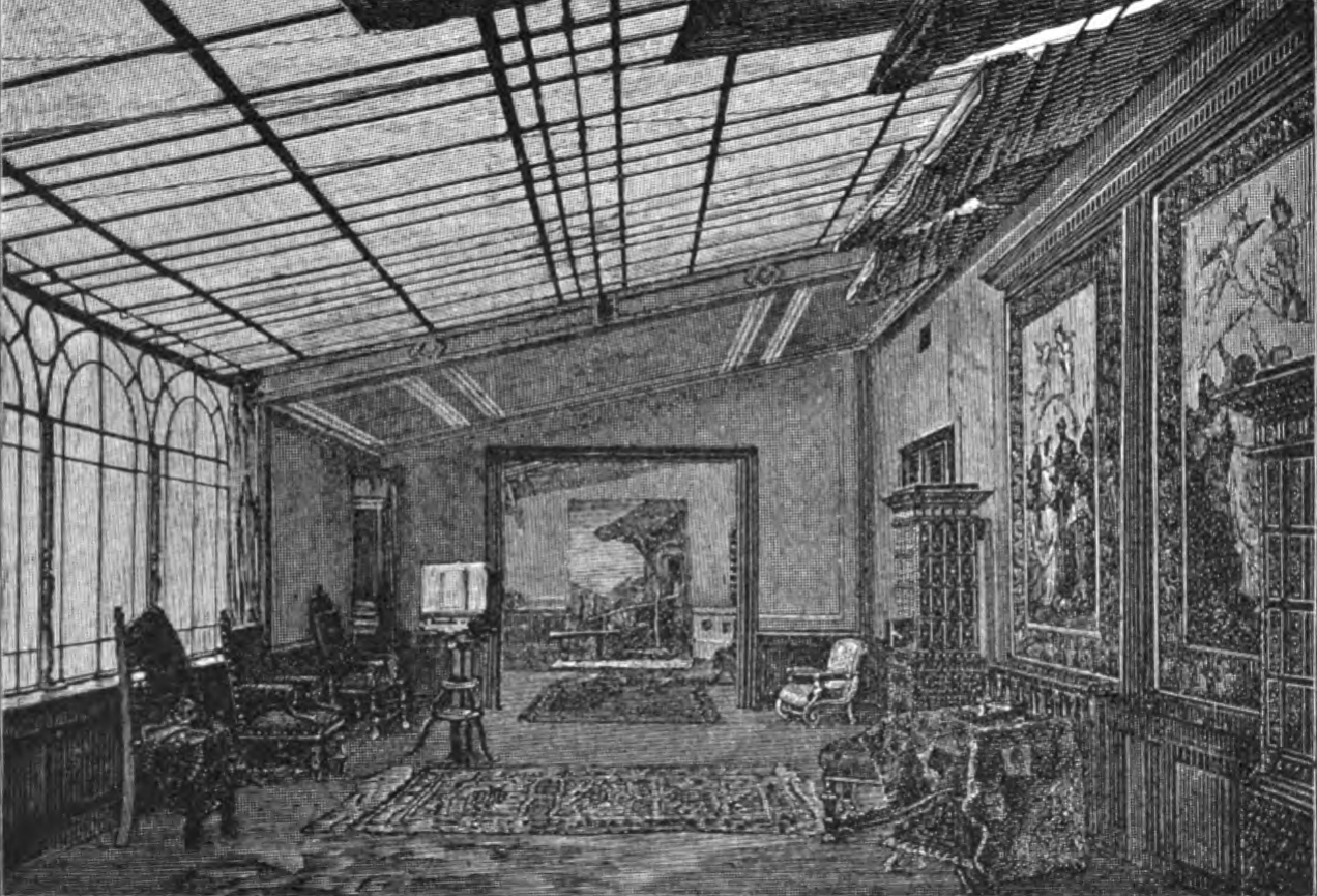 Interieur K. K. Hofatelier Adèle